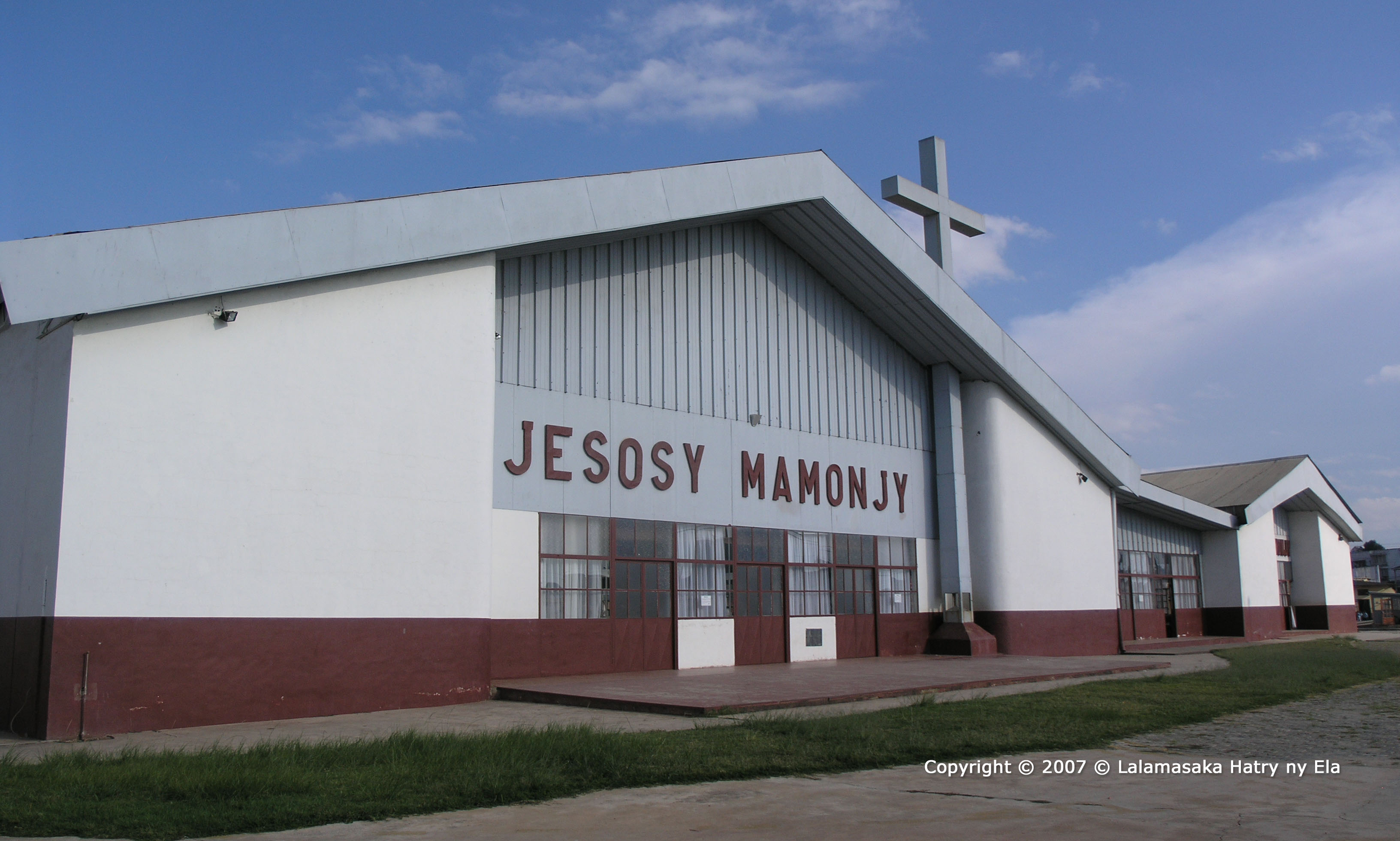 Malagasy: JesosyMamonjyAnkorondrano face